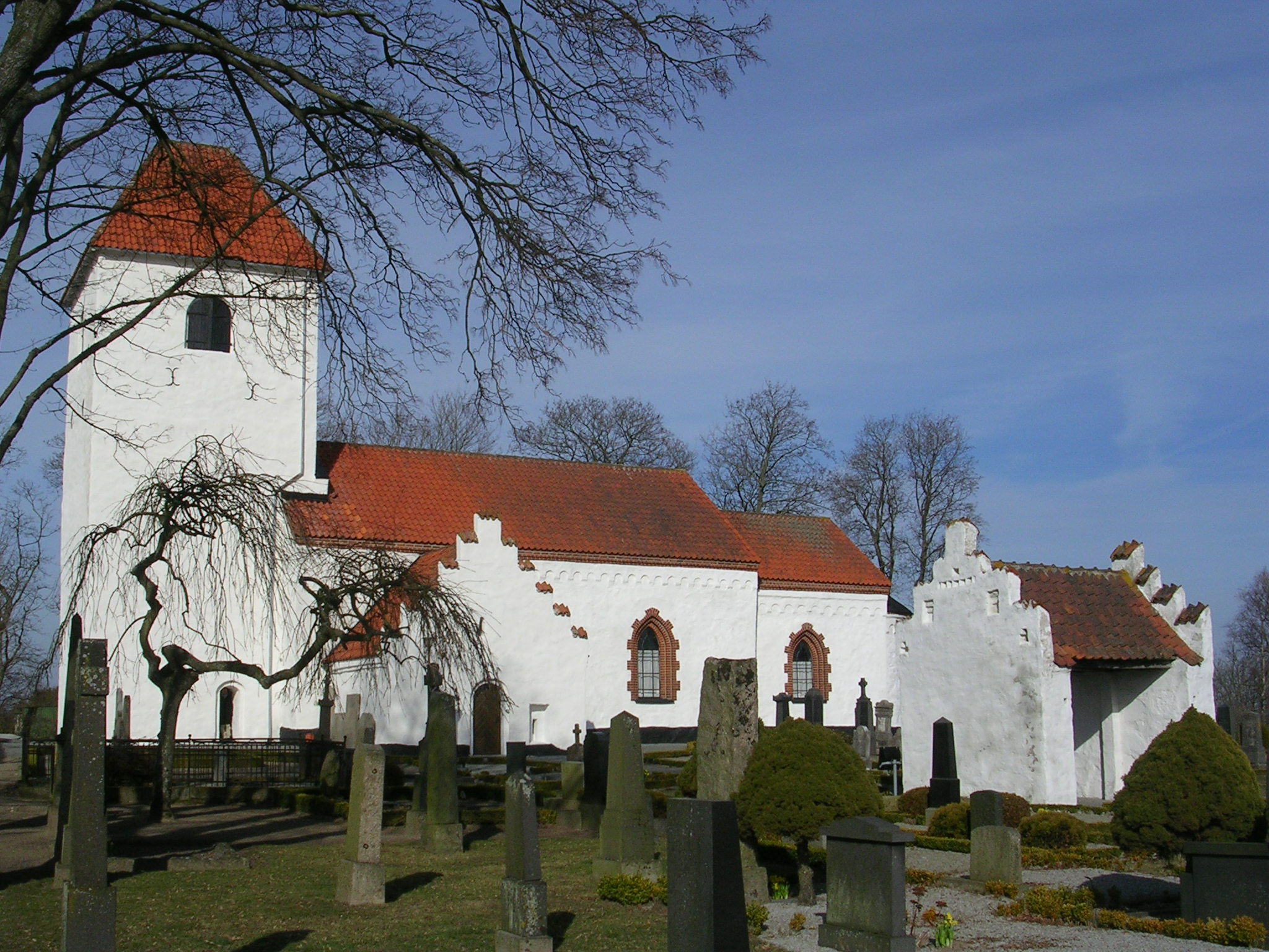 Everlövs kyrka Author: Väsk Date: March 2005